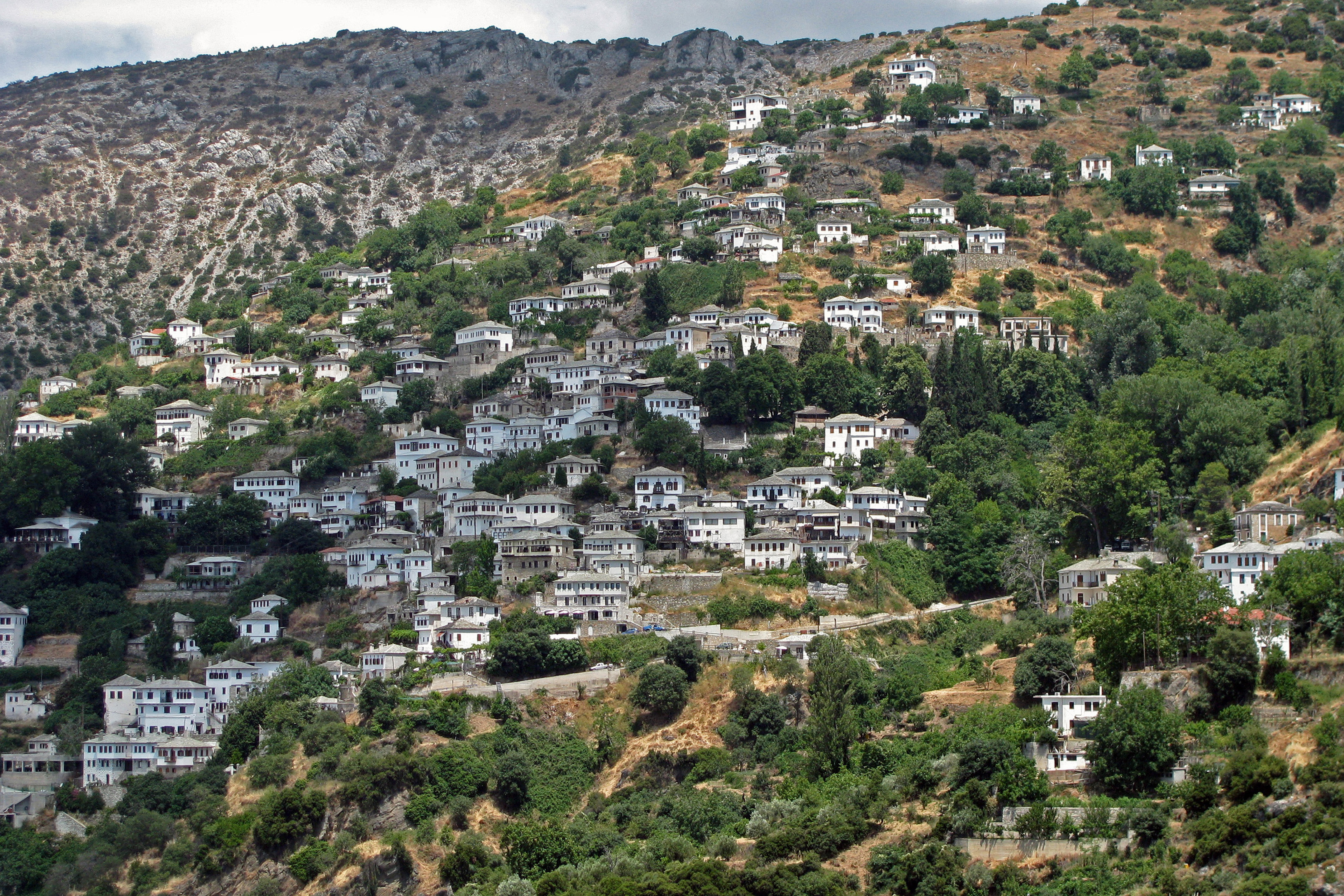 Μακρυνίτσα